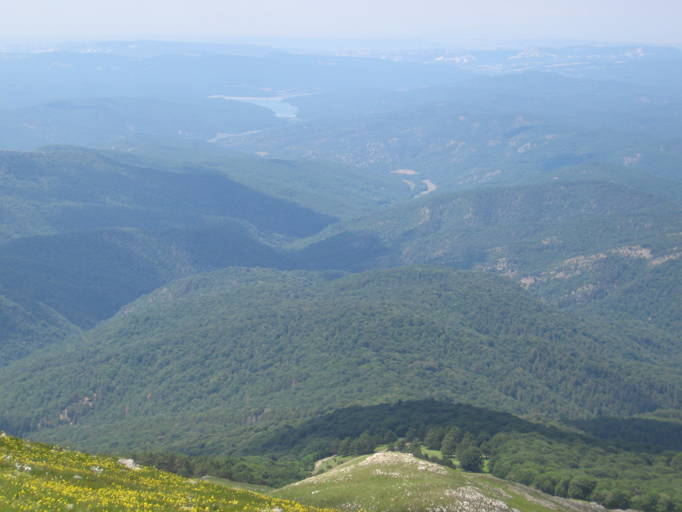 Кобузныген-Каясы. Долина реки Кача